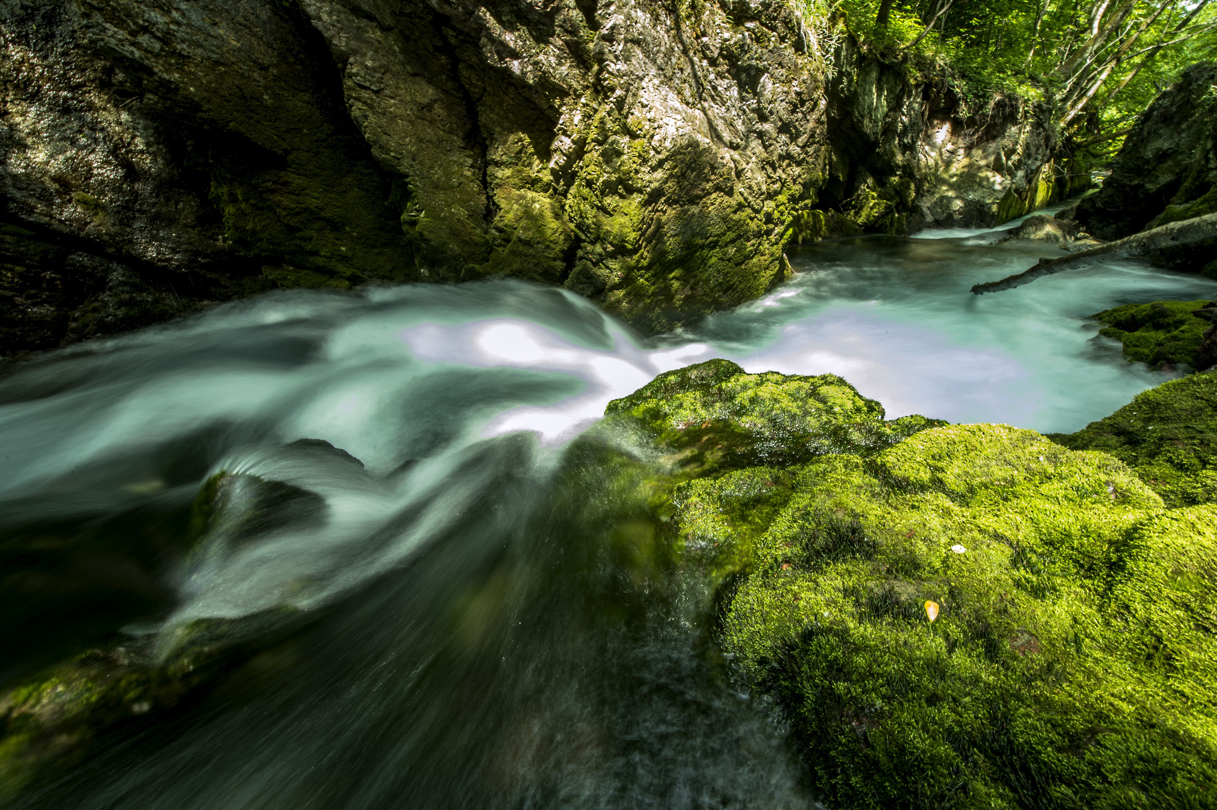 Ujëvara e Radacit